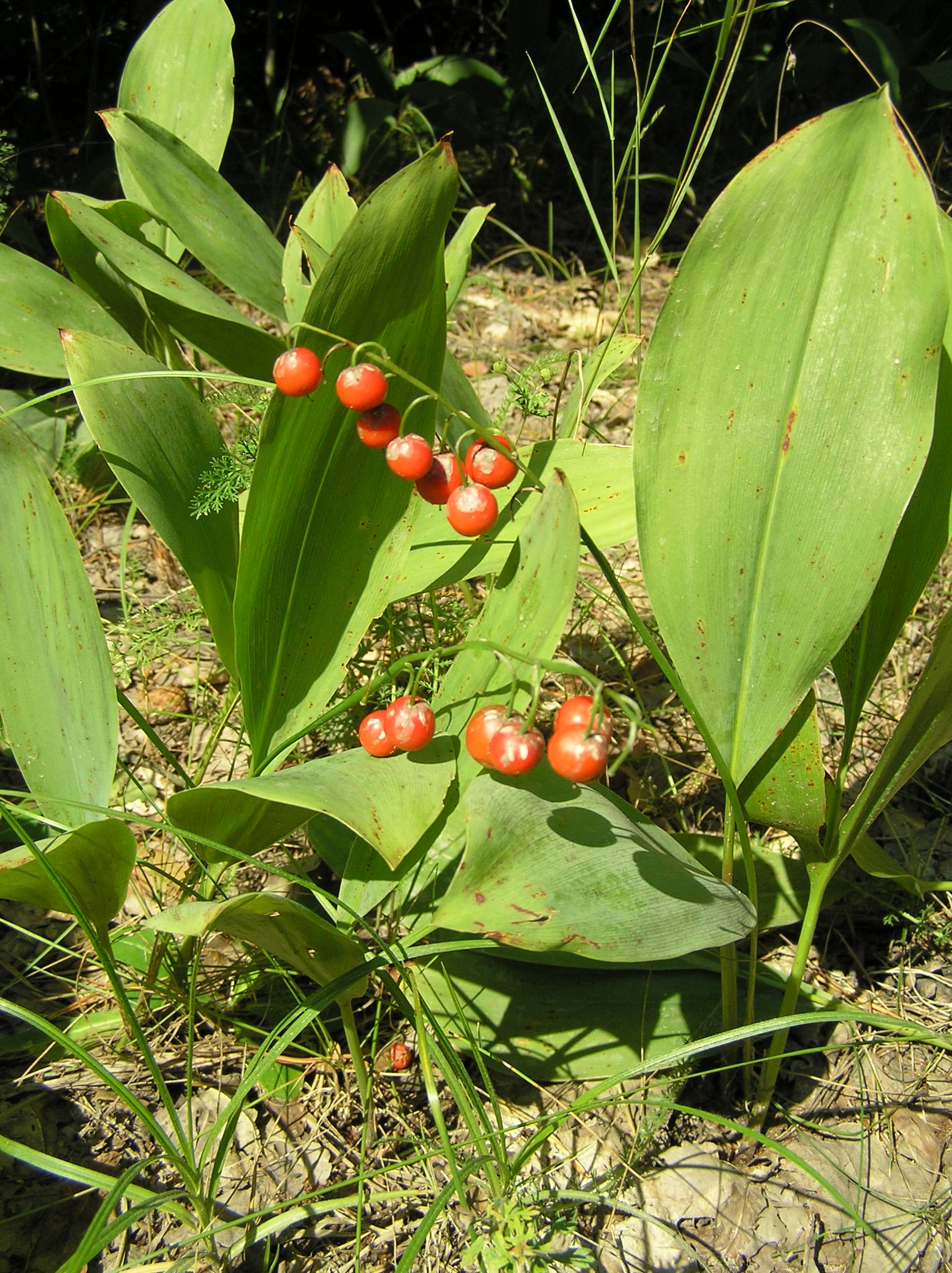 Convallaria majalis, konwalia majowa, Polska